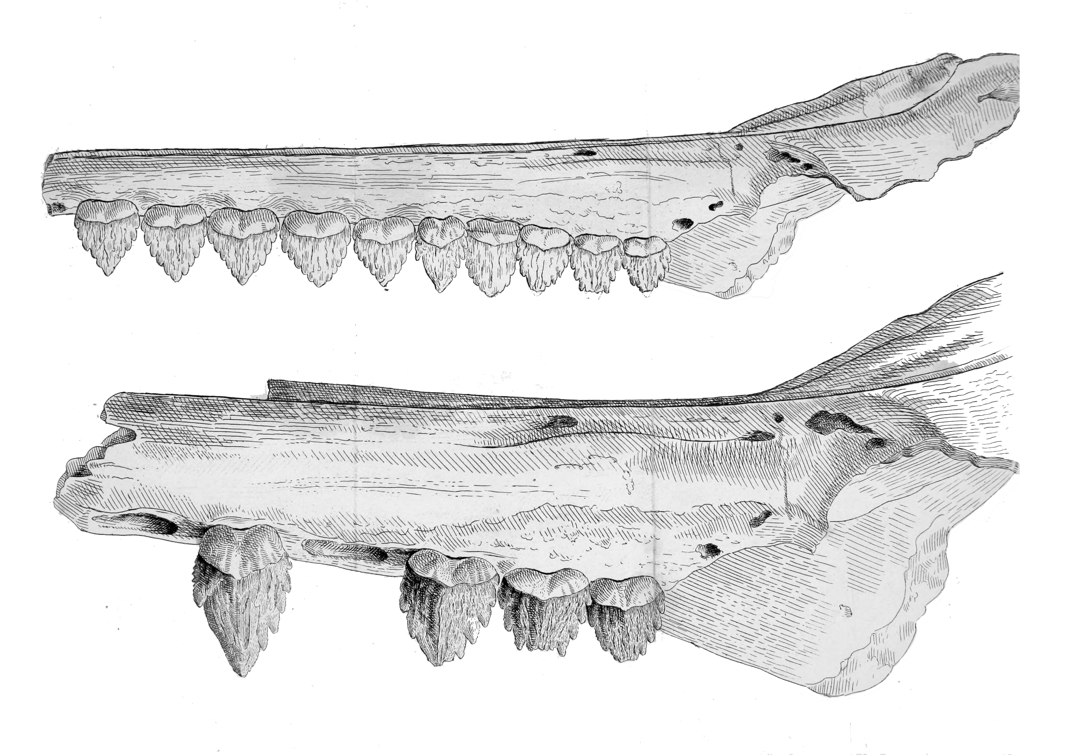 Squalodon's fossil